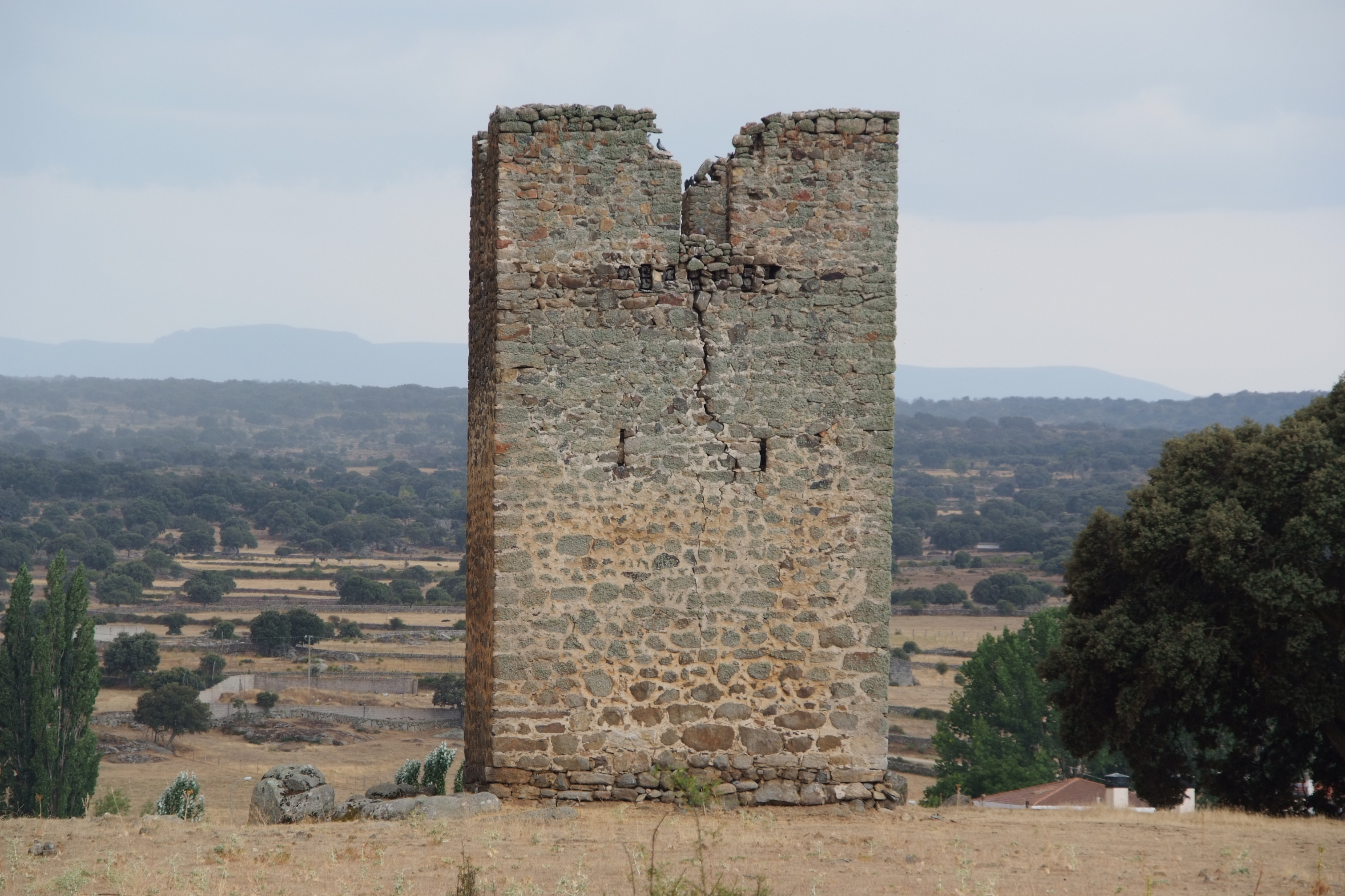 Torreón de Santibañez de Béjar (Salamanca; España)